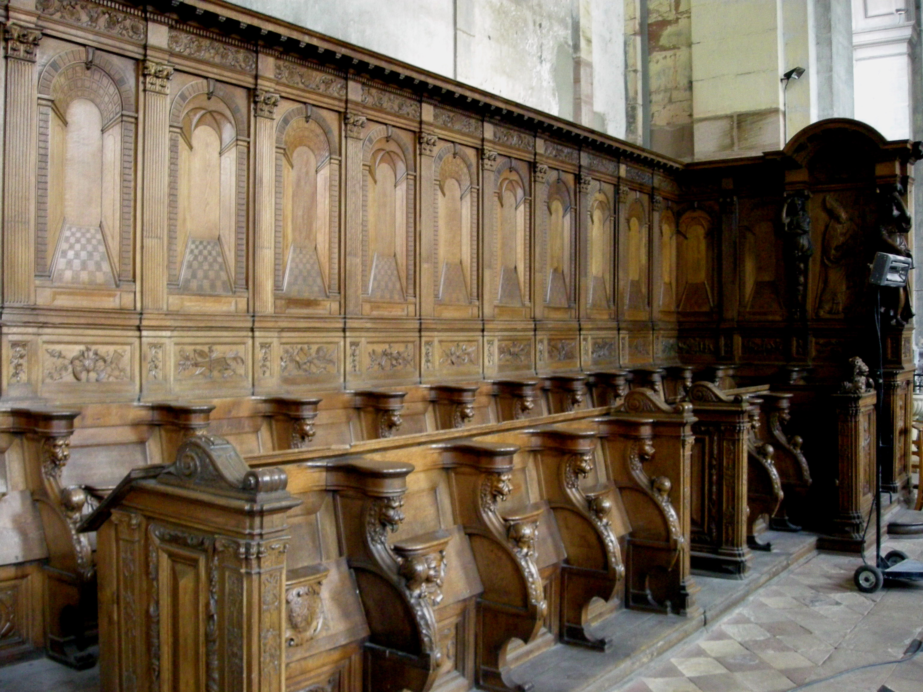 Stalles en bois du XVIIe siècle à l'église abbatiale de Moyenmoutier (Vosges)